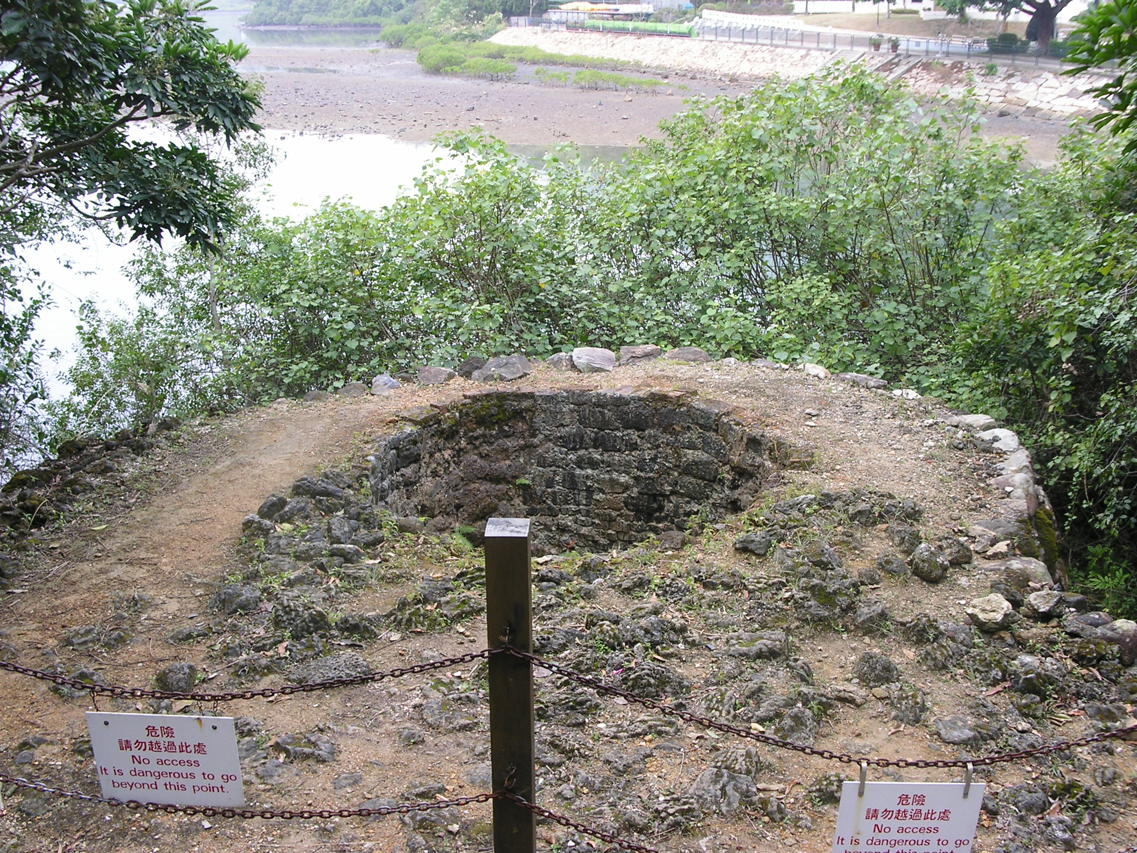 Photo taken in Sheung Yiu,Hong Kong.於上窰村所拍攝的窰坑遺址。